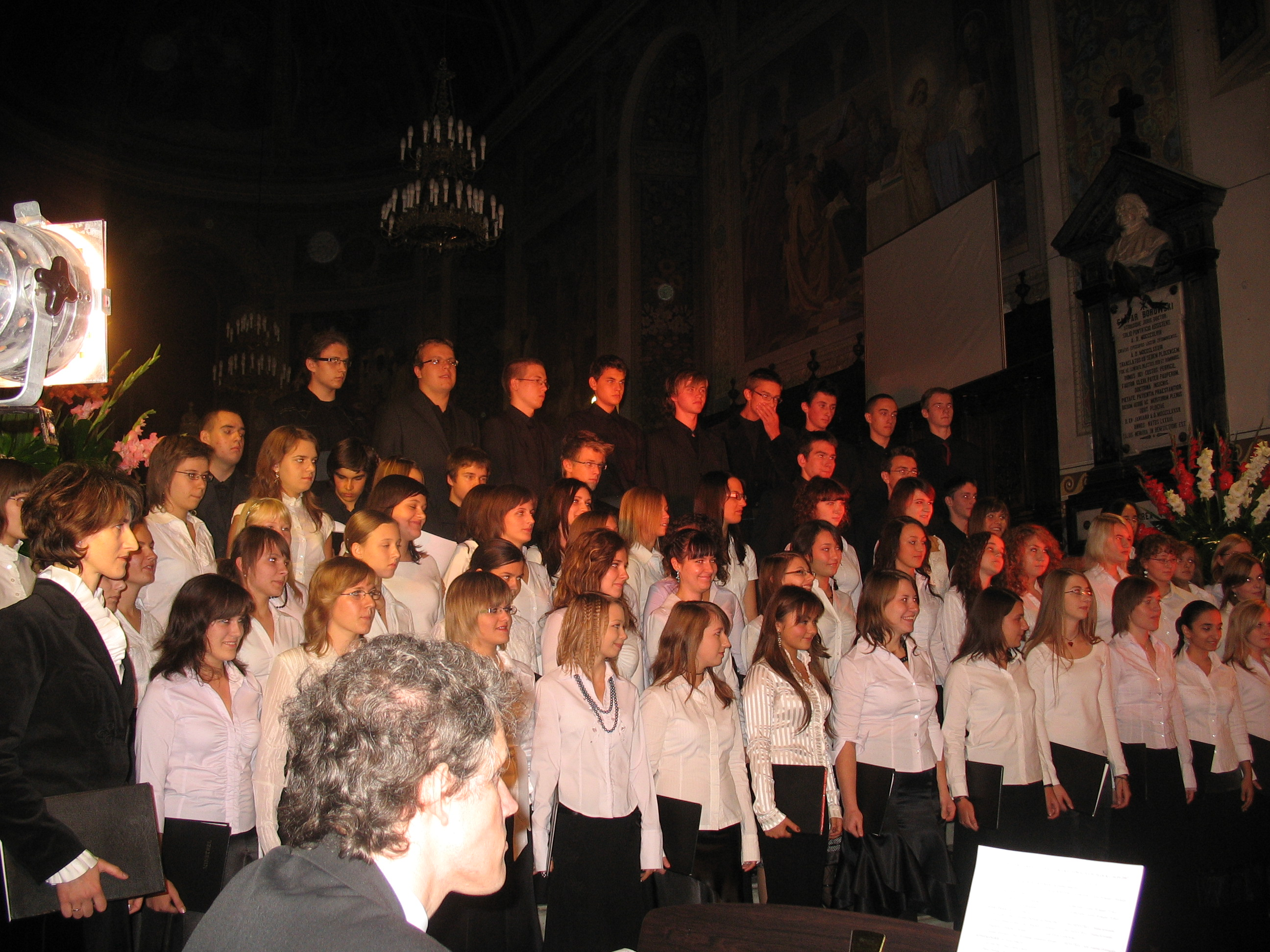 Koncert muzyki sakralnej w wykonaniu chóru Minstrel z Płocka, bazylika katedralna w Płocku, 30 września 2007.